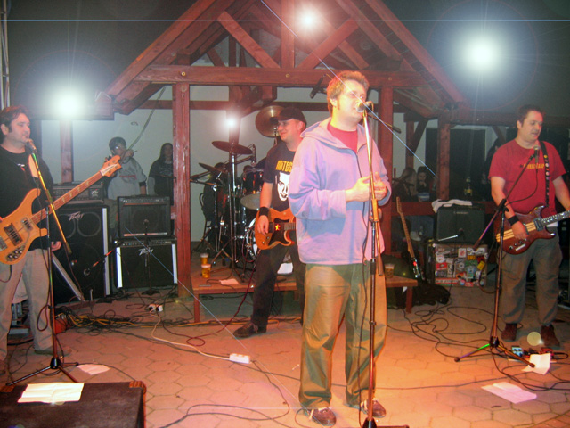 Ускршњи рок маратон 2007, Шабац - Atheist Rap